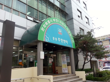 중동주민센터